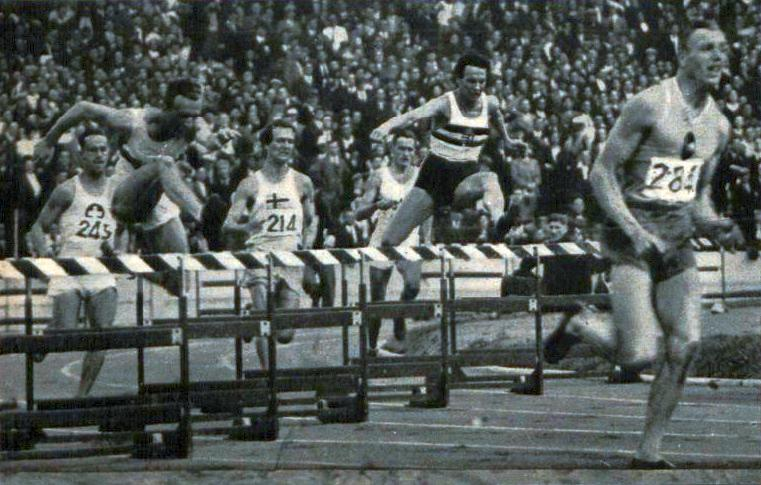 400 mètres haies des championnats d'Europe 1938, Joye devant Kovacs et Areskoug.